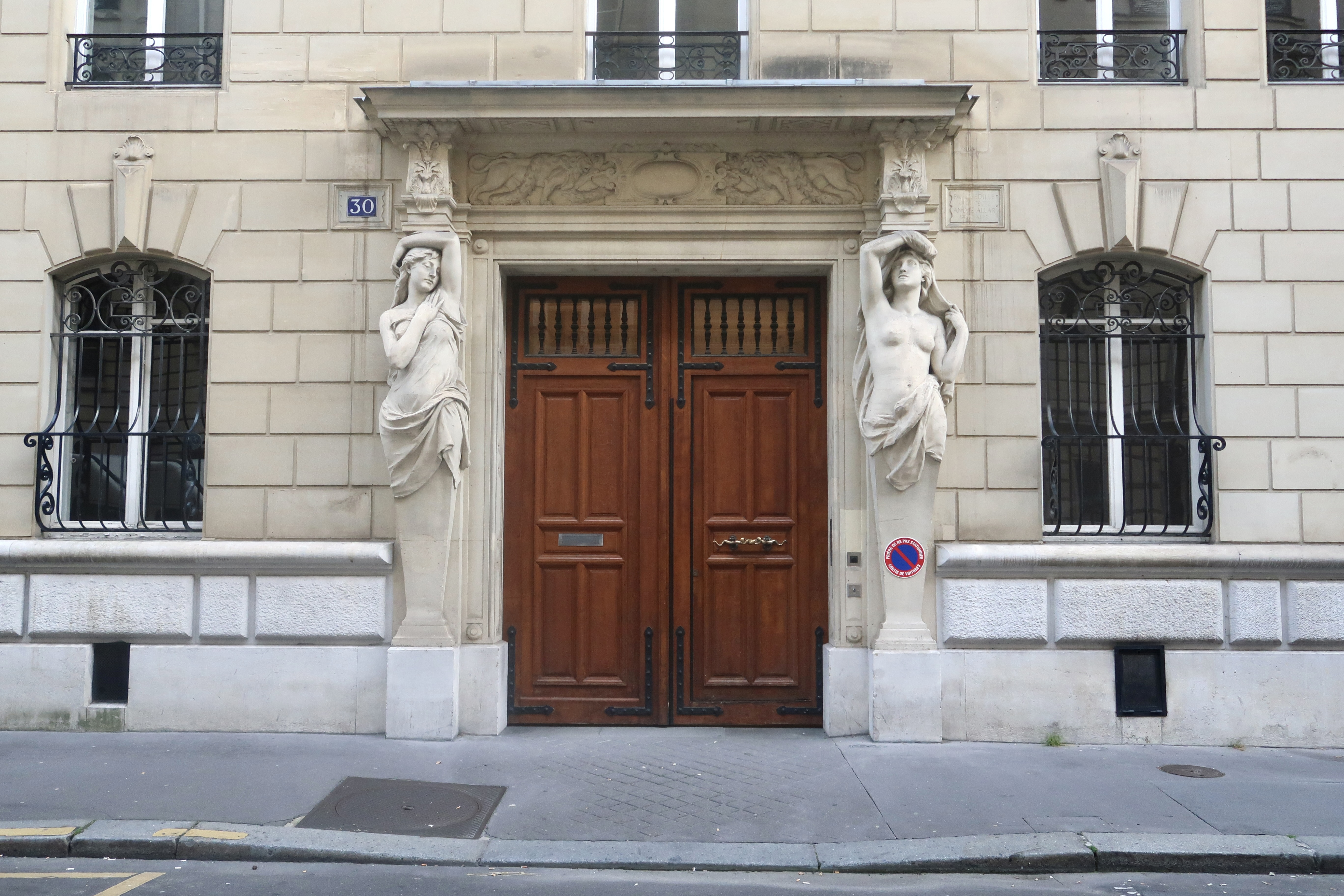 N°30 rue Galilée (Paris).